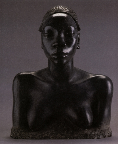 Jeanne Tercafs, Nito, Mayogo-vrouw, graniet, 1937, 51 x 35,8 cm, Collectie KMMA Tervuren, H0.0.1.457.